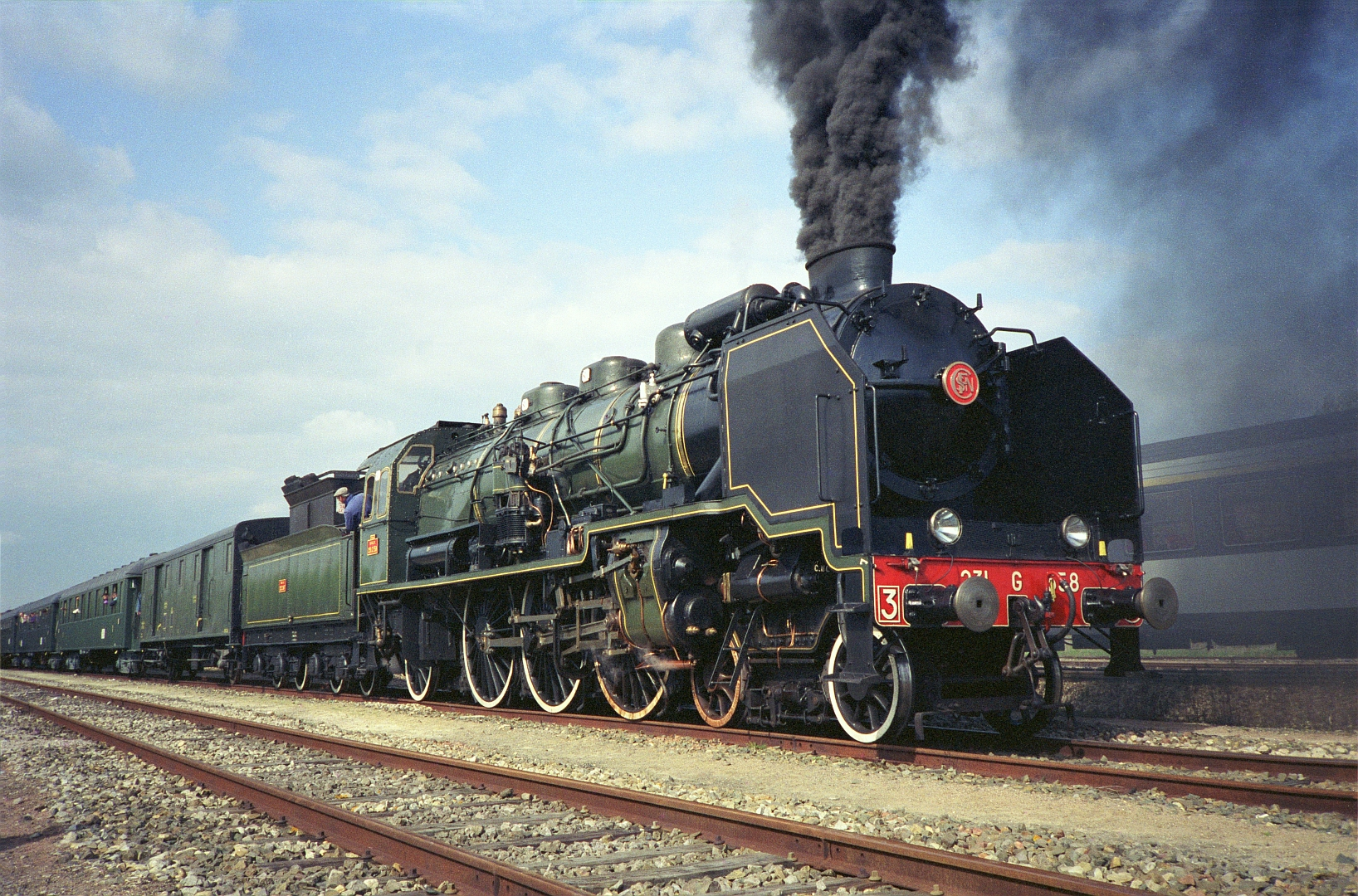 La 231 G 558 en gare de Noyelles-sur-Mer le 2 mai 1992.